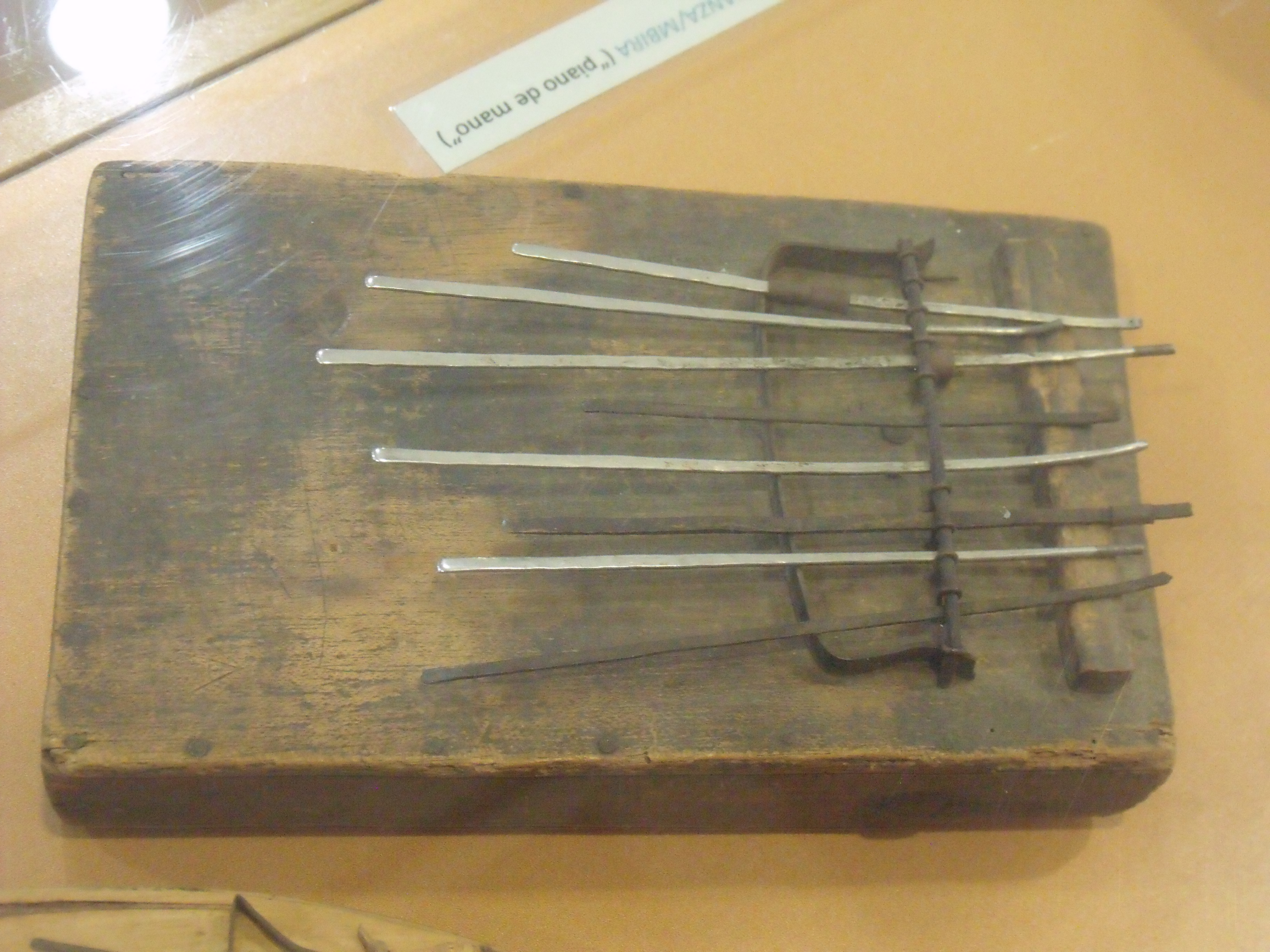 Piano de mano de Burundi